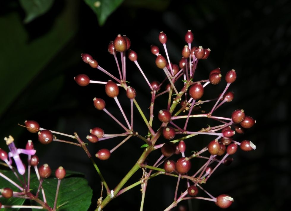 Fuchsia paniculata, Palmengarten, Frankfurt am Main, Hessen, Deutschland